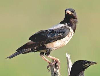 Pastor roseus